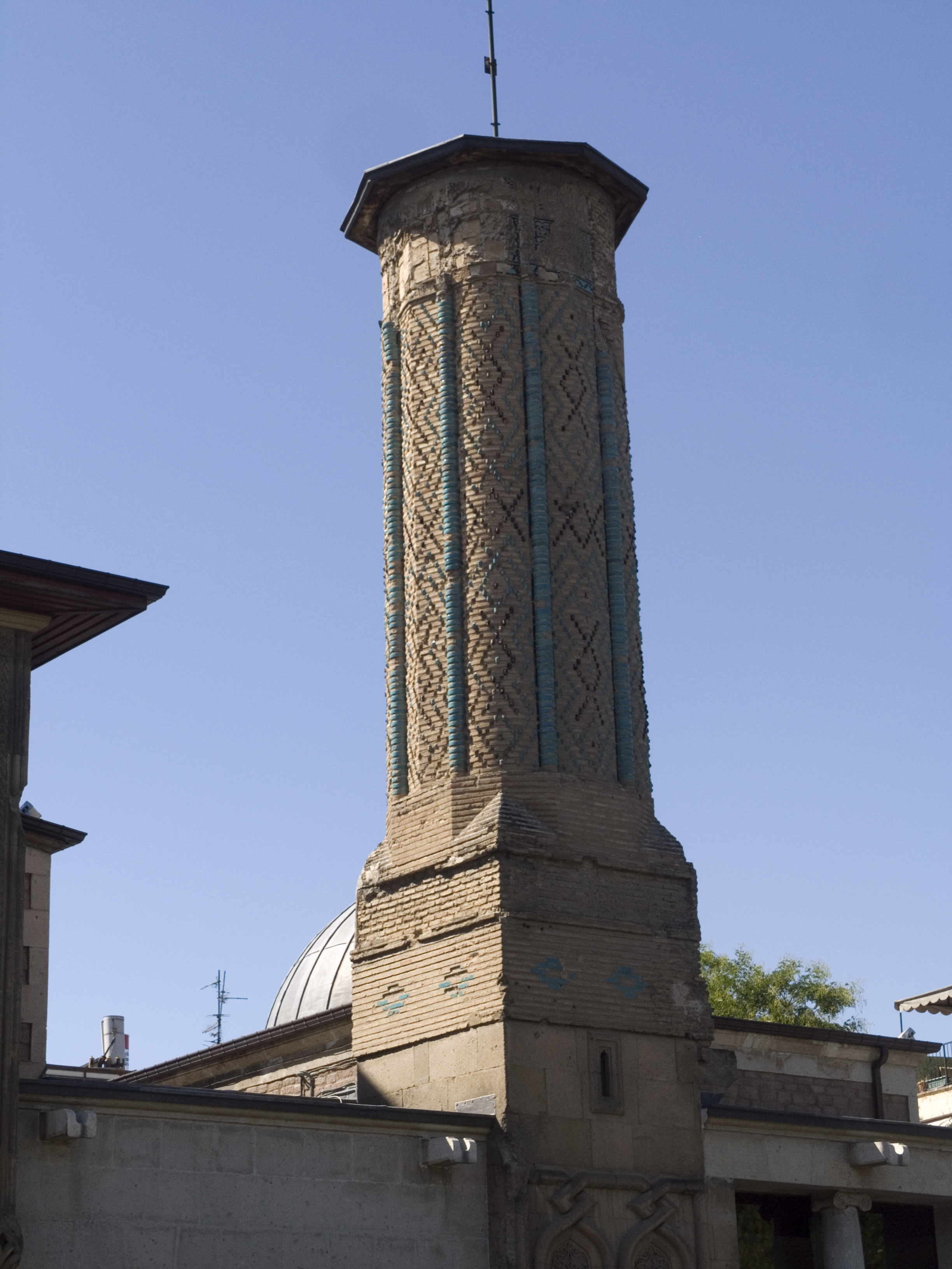 Турция, Конья – Медресе Тонкого минарета